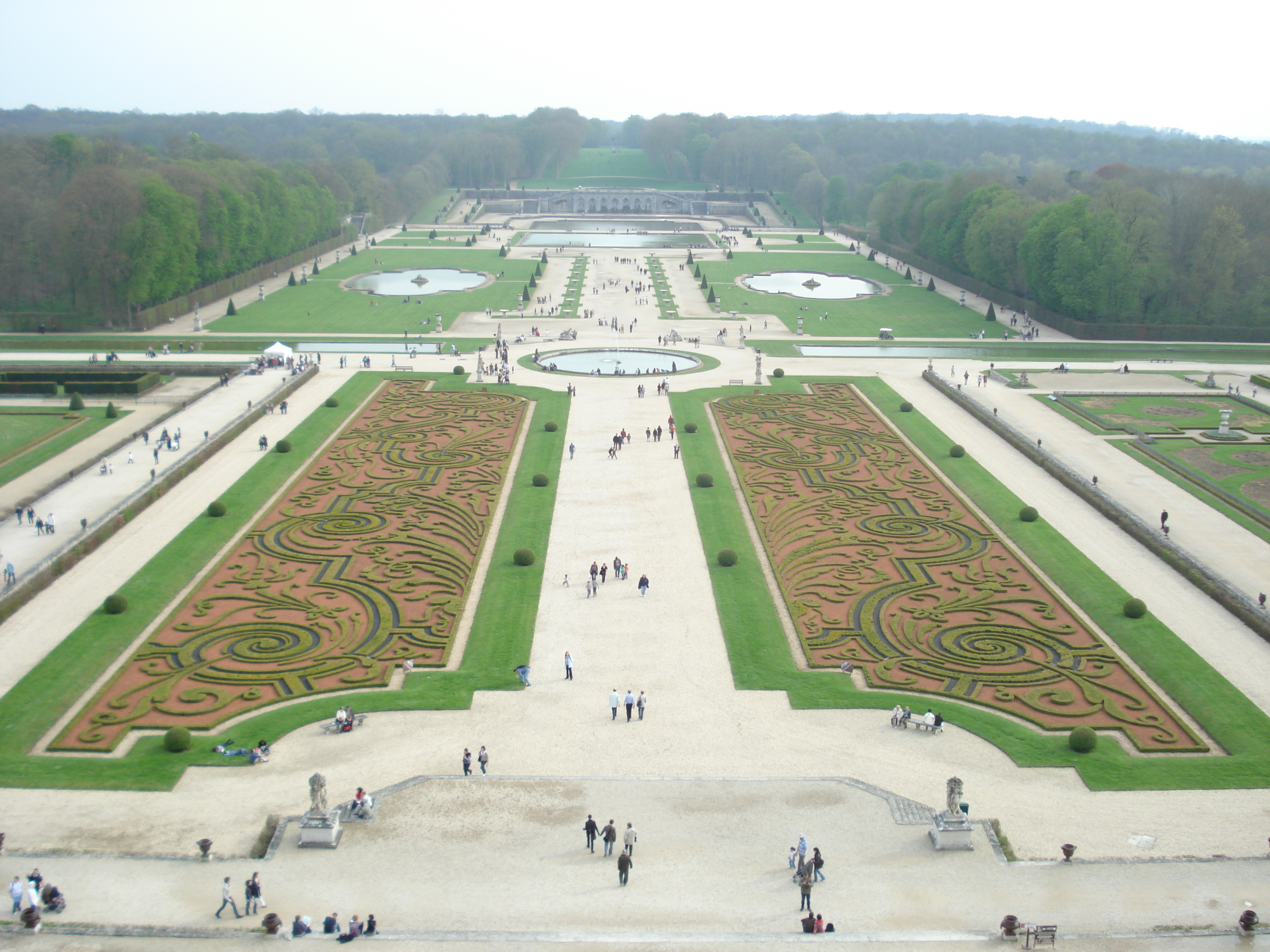 Vista panorámica de los jardines del palacio de Vaux-le-Vicomte (Francia)